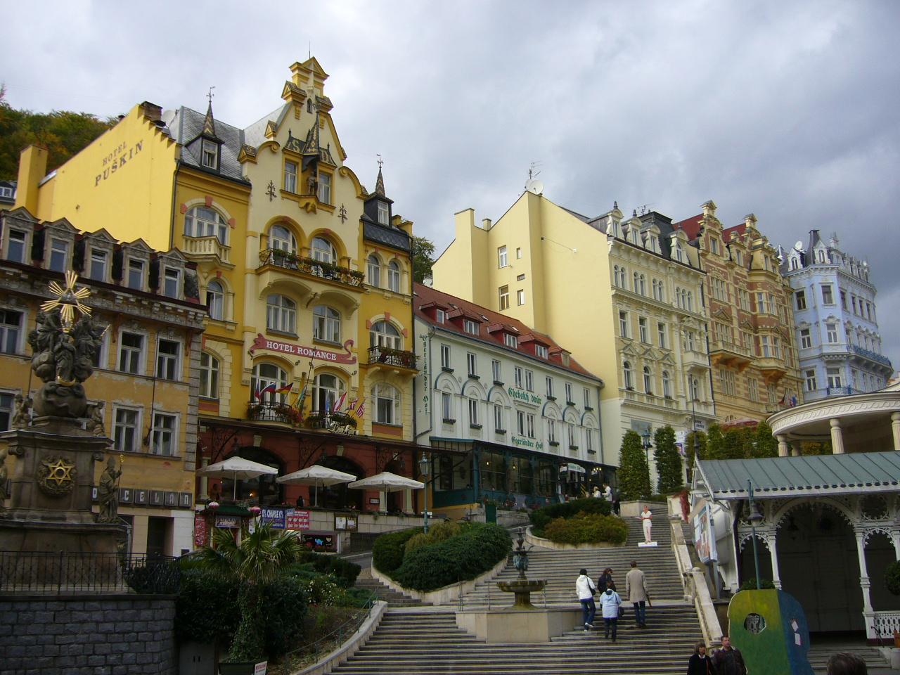 Karlovy Vary (Cidade Balneario), República Checa, Setembro 2007